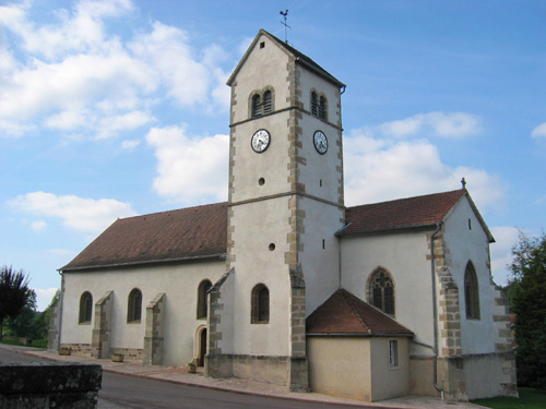 Eglise Saint-Valbert